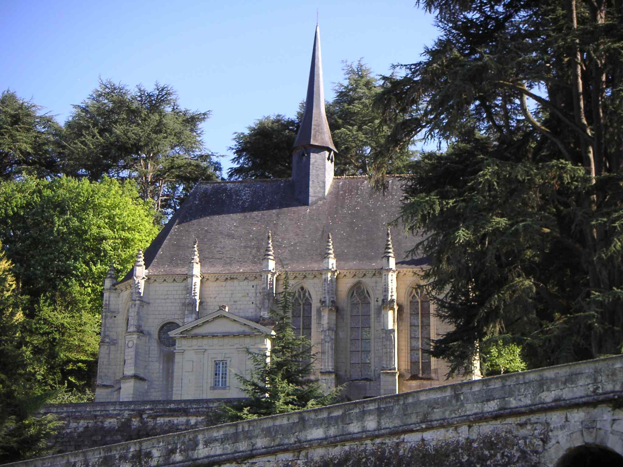 Vue de la chapelle du château d'Ussé prise des jardins par mes soins